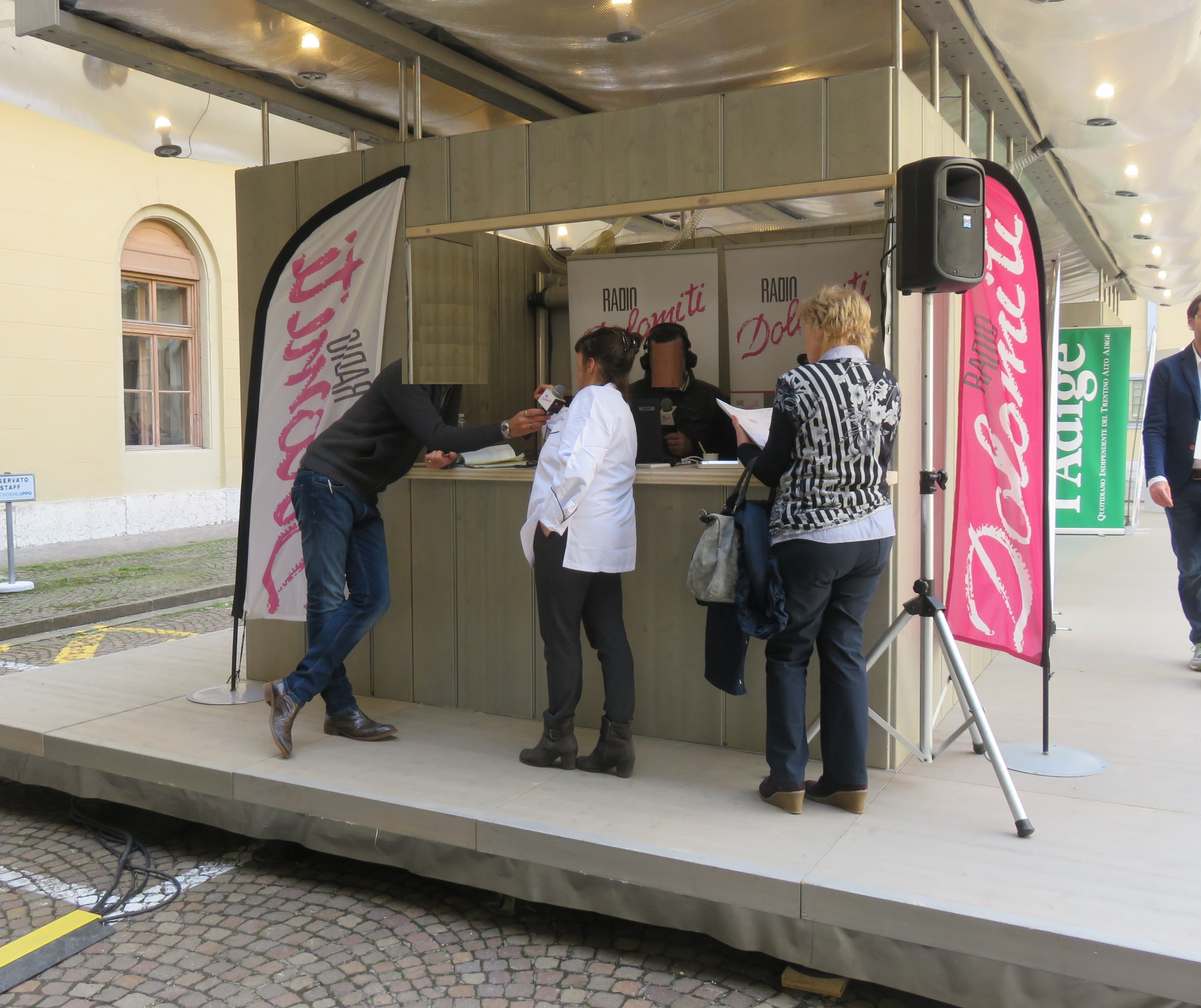 Postazione di Radio Dolomiti presso Artingegna 2018 (Festival dell’artigianato negli spazi di Progetto Manifattura)